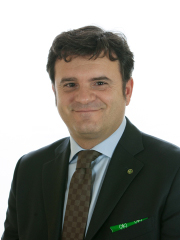 Gian Marco Centinaio